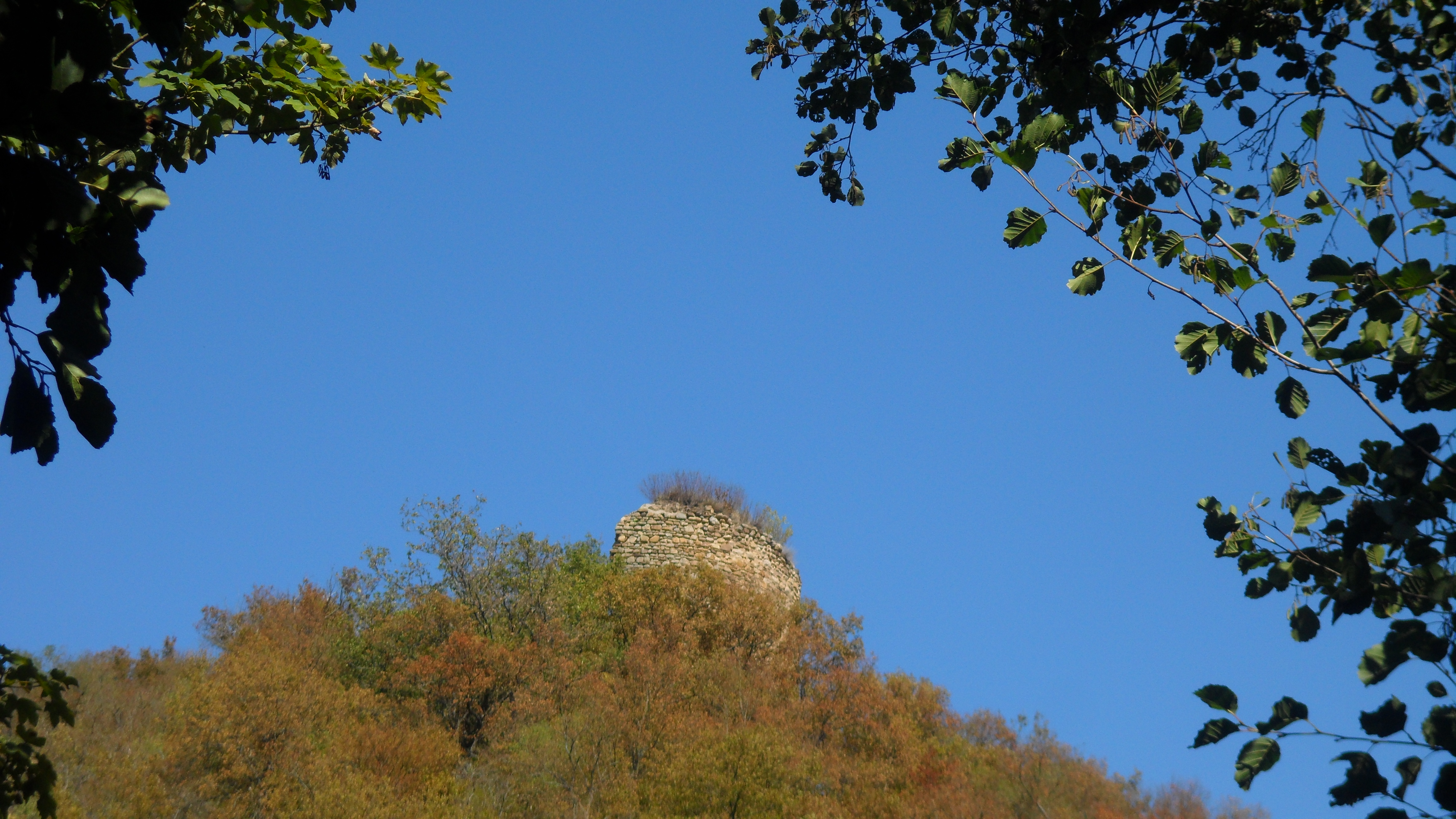 Burgsponheim, Überreste der zerstörten Burg Sponheim - Rundturm.